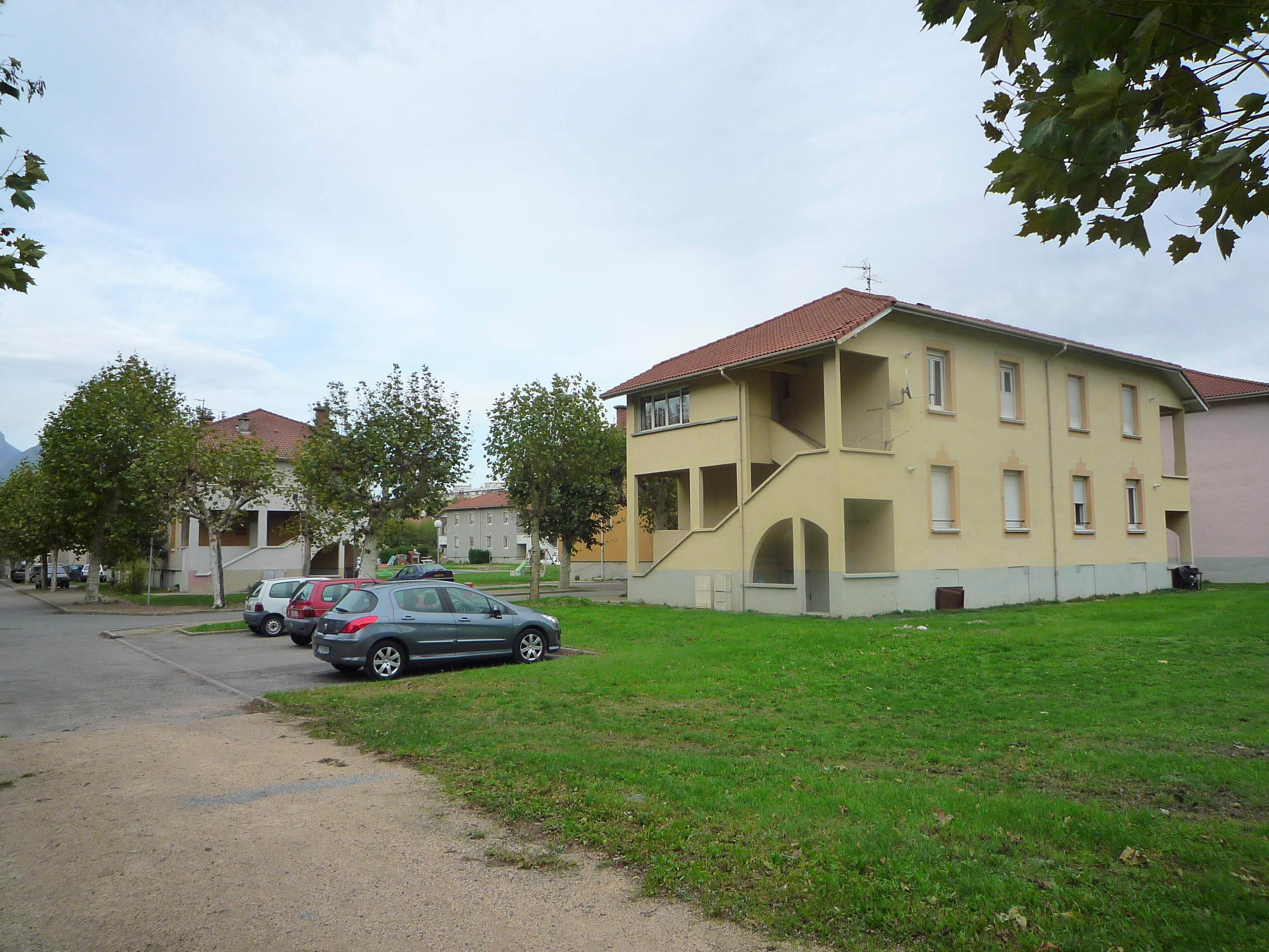 Cité Viscose à Échirolles près de Grenoble. Construite de 1926 à 1927 pour l'usine de la viscose (future Cellatex), elle est constituée d'un grand nombre de petits bâtiments presque identiques et rénovés dans les années 1990 après la fermeture de l'usine.